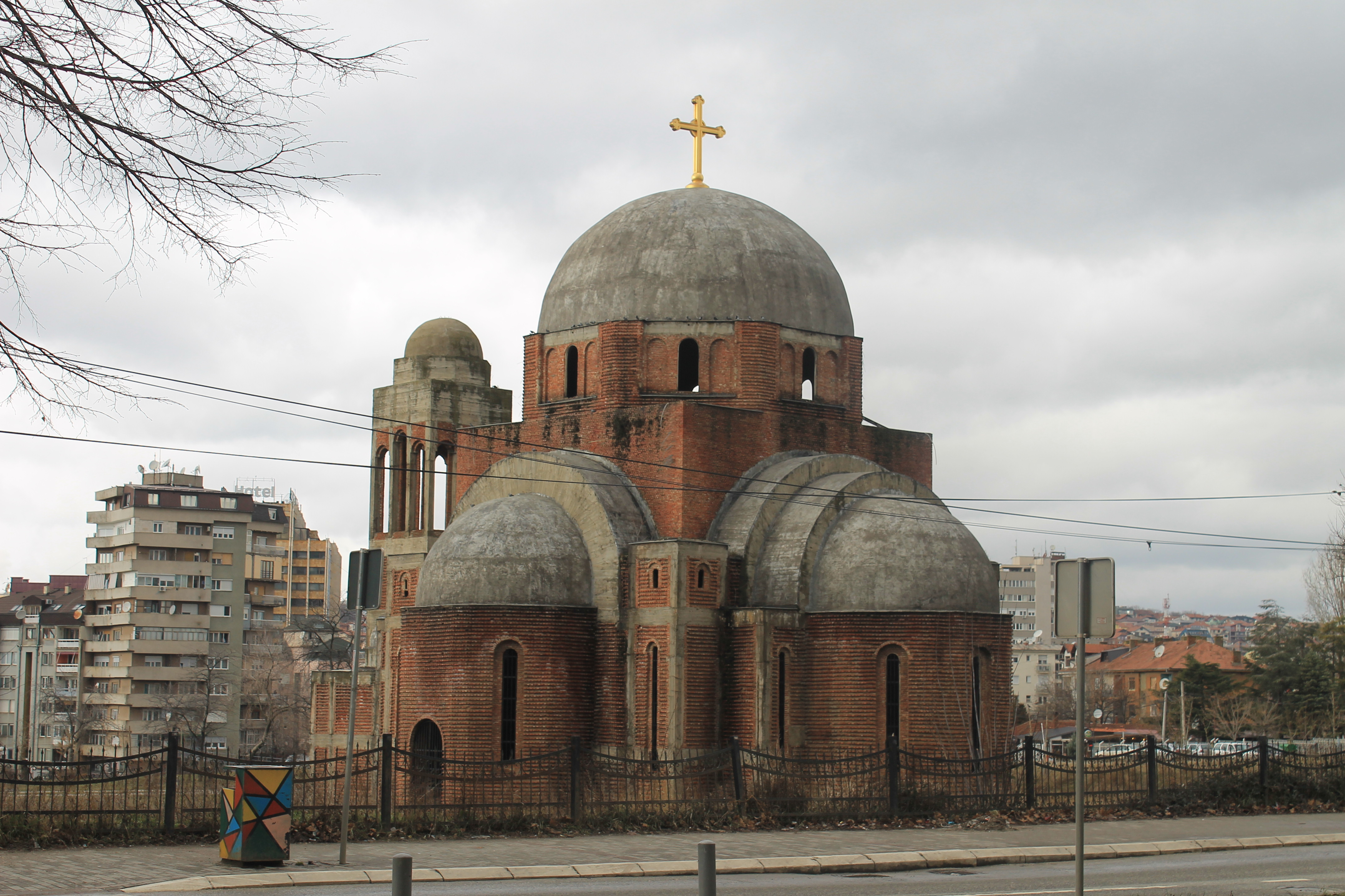 Kisha Ortodokse Serbe e ndërtuar gjatë regjimit të Sllopodan Millosheviq në Kompleksin e Universitetit të Prishtinës